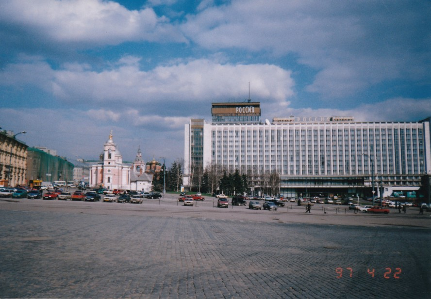 Москва, гостиница Россия, 1997 год